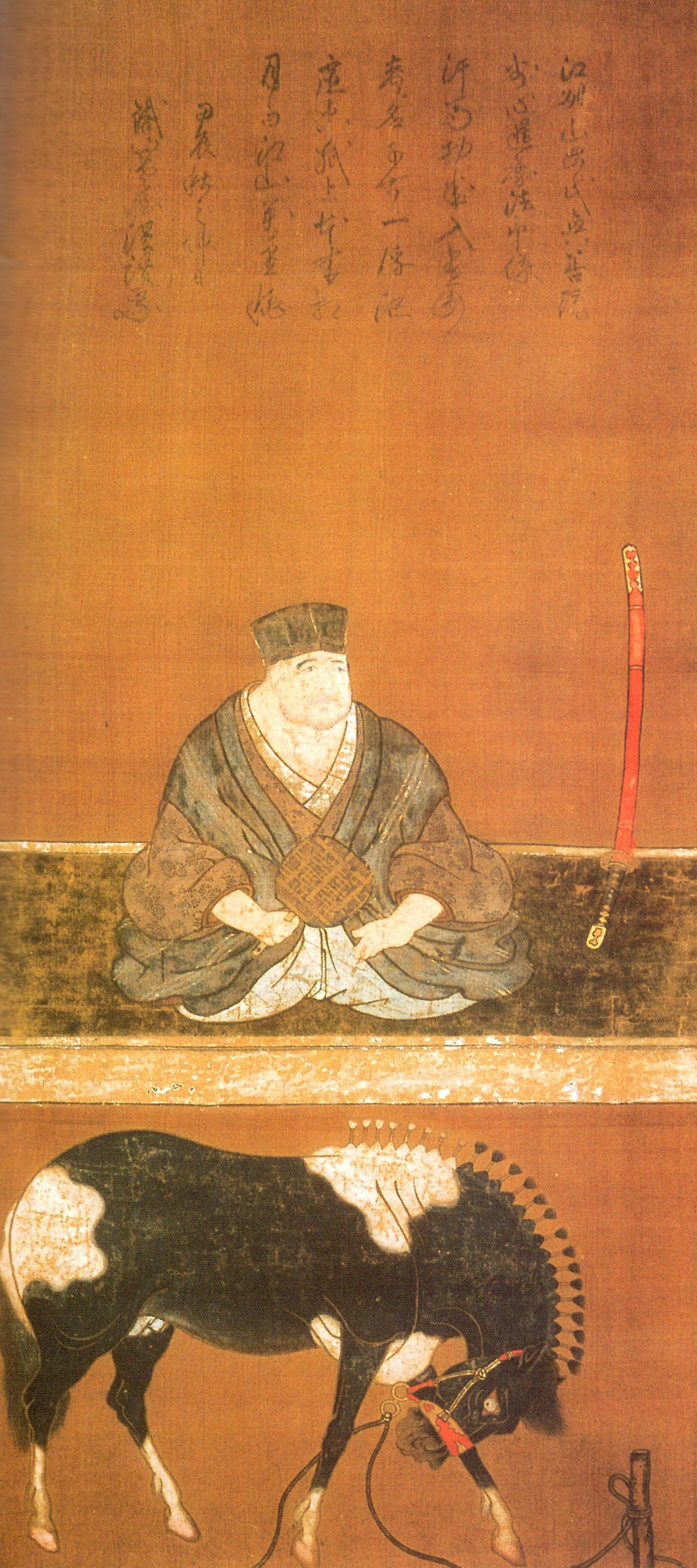 山岡景友の肖像。